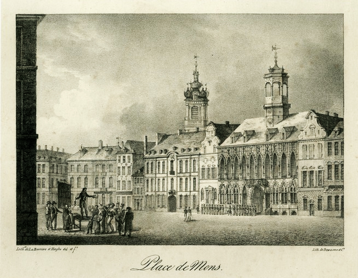 Lithographie publiée en 1823-1824 représentant la grand Place de Mons (auteur:Barrière et Hagué)